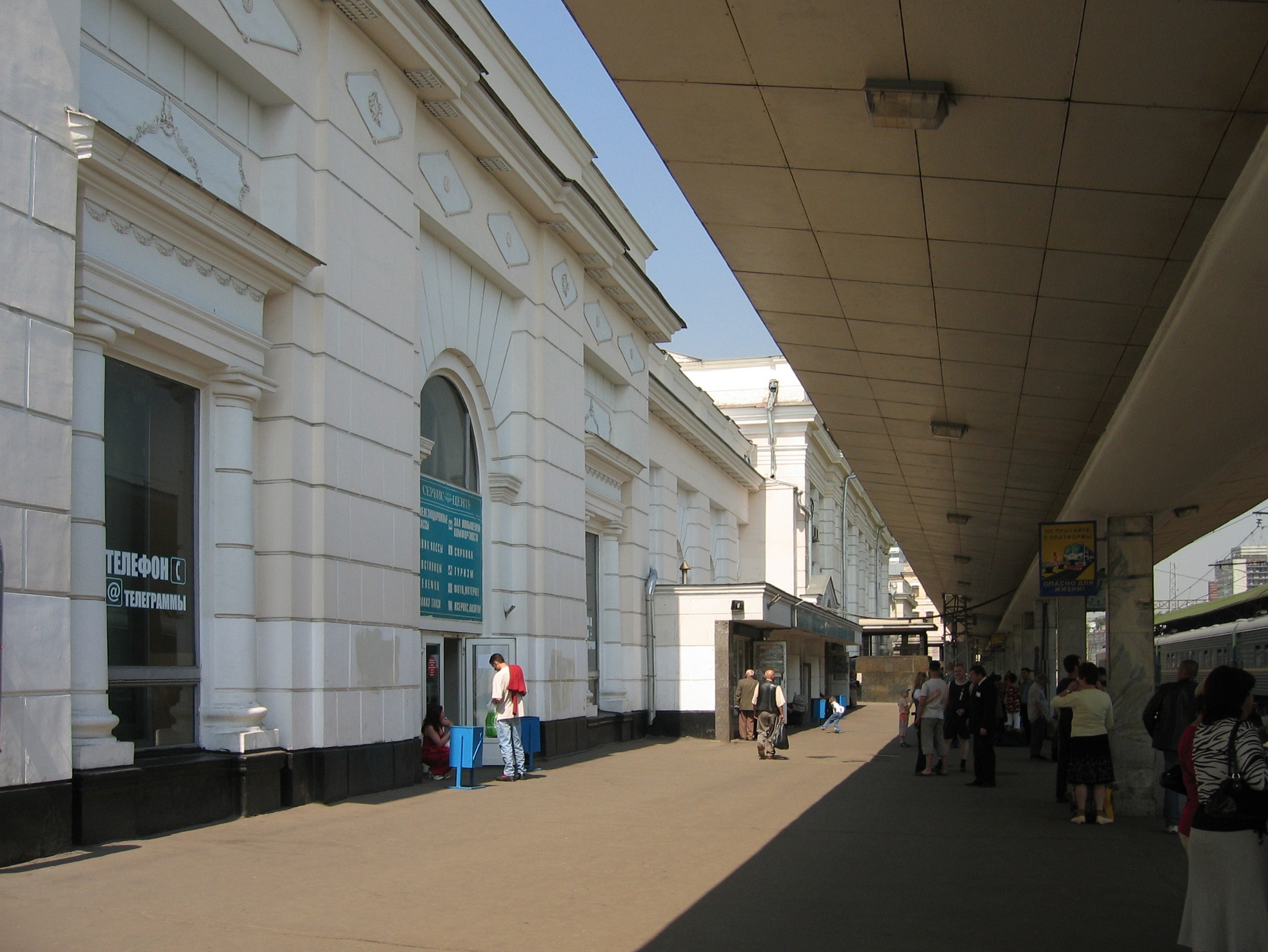 Курский вокзал (старое здание вокзала)